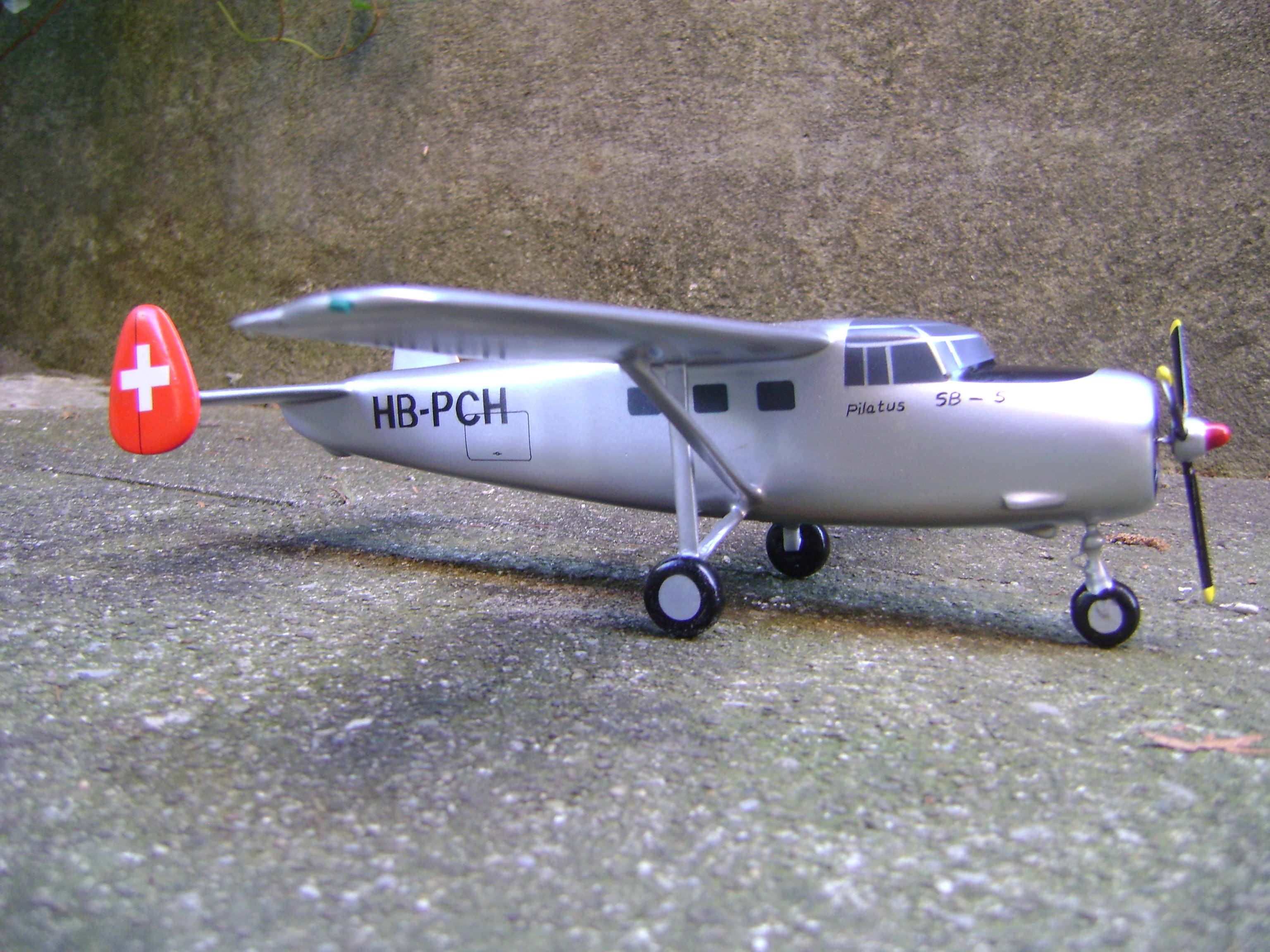 Pilatus SB-5 Side